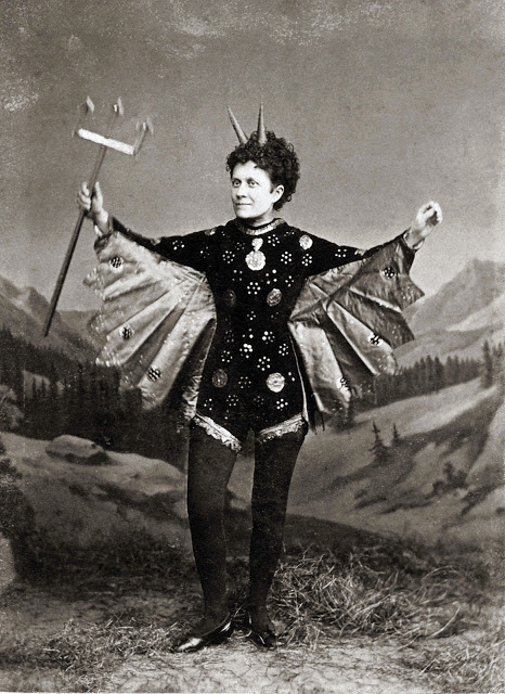 Bényiné Harmath Emma magyar operett énekesnő.